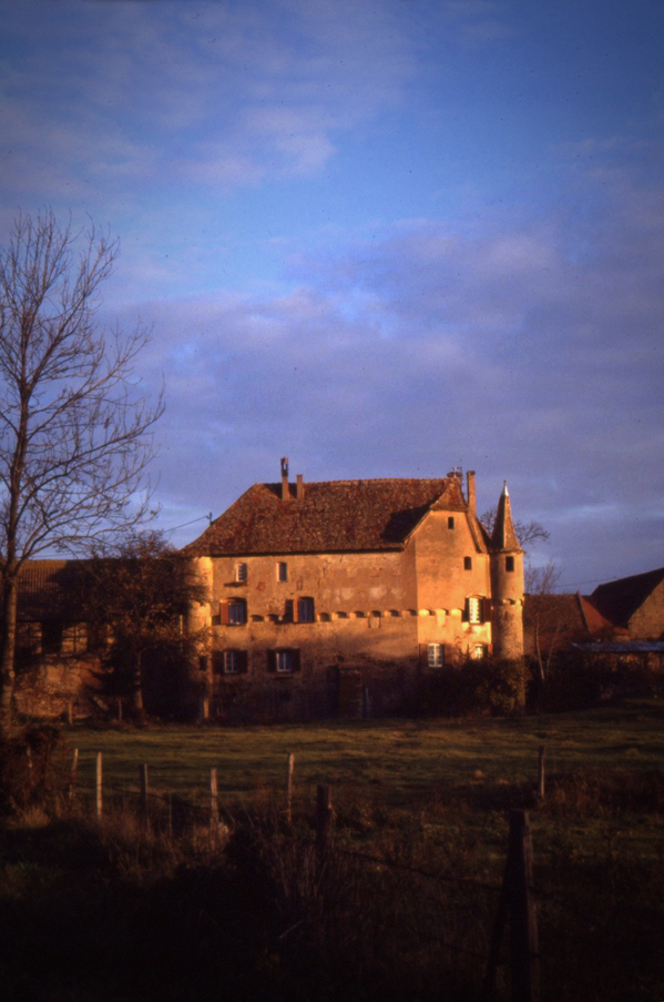 Chateau de Breuschwickersheim (Bas-Rhin) vu depuis la route vers Hangenbieten.